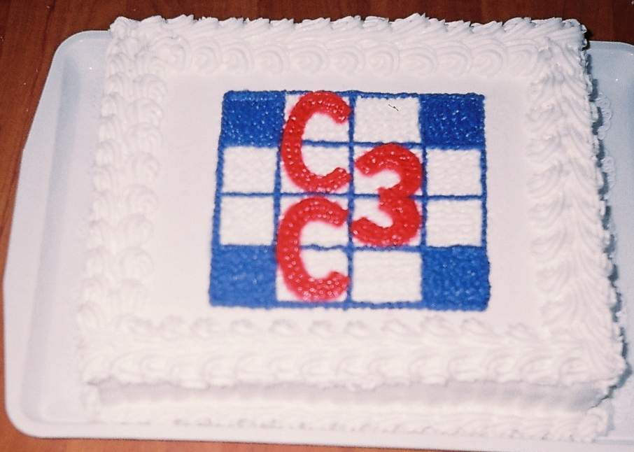 Savez zagonetača Srbije (logo na torti)